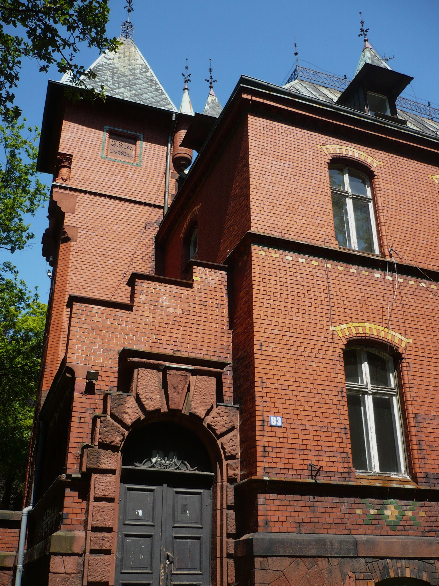 Nowa Ruda, ul. Mikołaja Kopernika 8 - Willa Rose, 1886